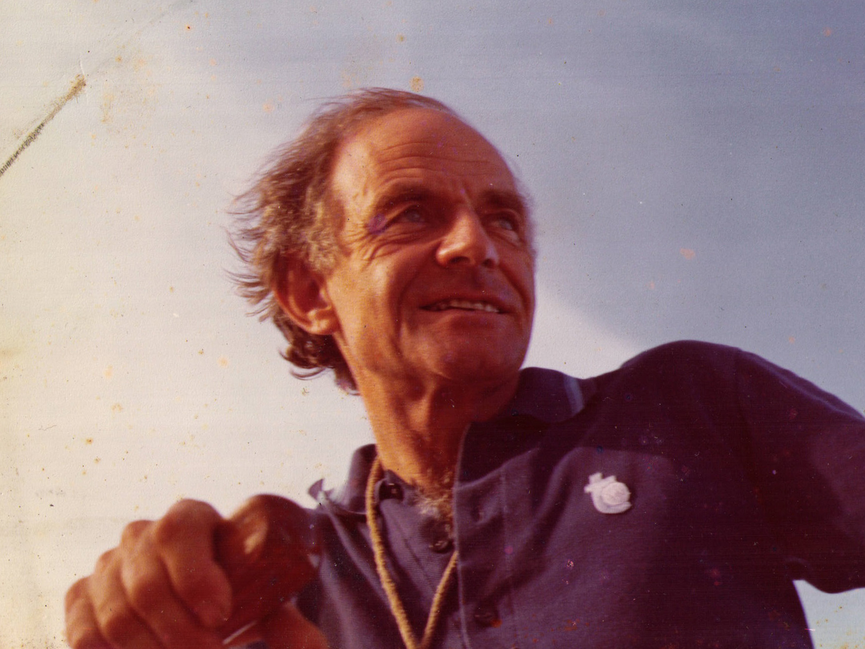 Erico Spinadel, Learning from the Wind